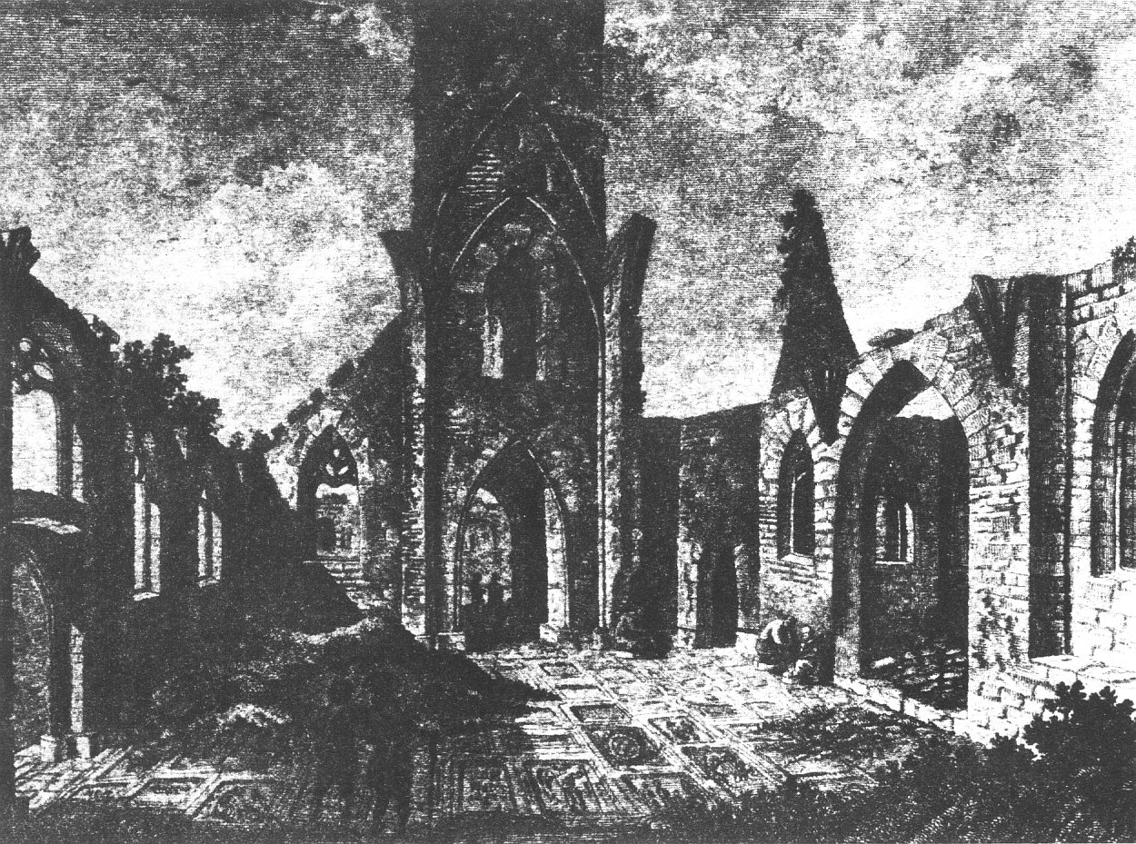 Speyer, ehem. Moritzstiftskirche, Radierung von 1783